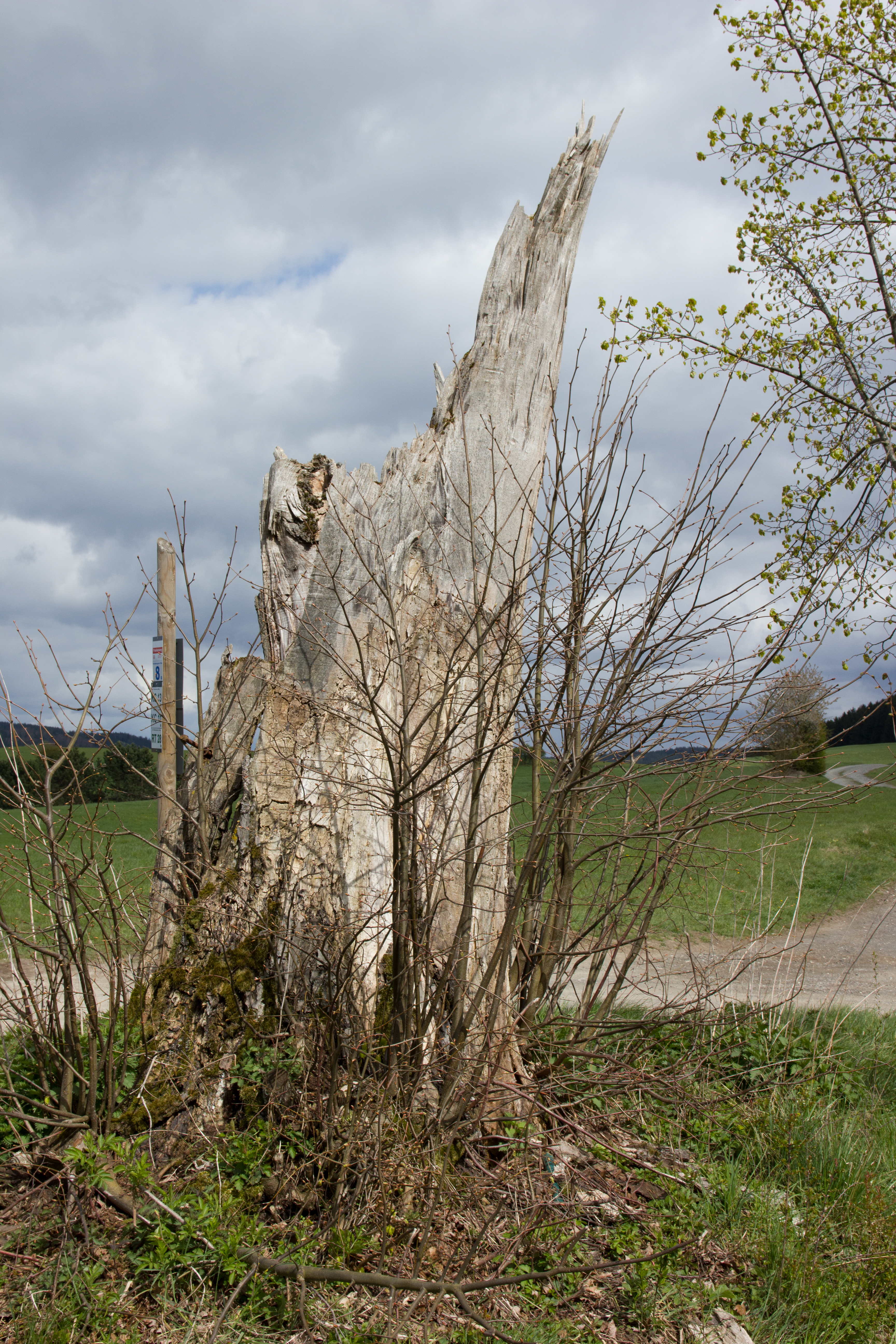 Rennesberger Linde (durch Blitzschlag beim Sturm Kyrill zerstört) (wird oft als Naturdenkmal beschrieben)